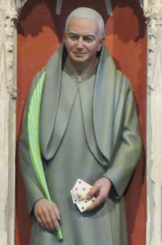 Statues polychromes sur le jubé de la cathédrale de Saint-Alban (de gauche à droite) d'Oscar Romero, Alban Roe, Amphibalus, Alban, George Tankerfiels, Elisabeth Romanova et Dietrich Bonhoeffer.